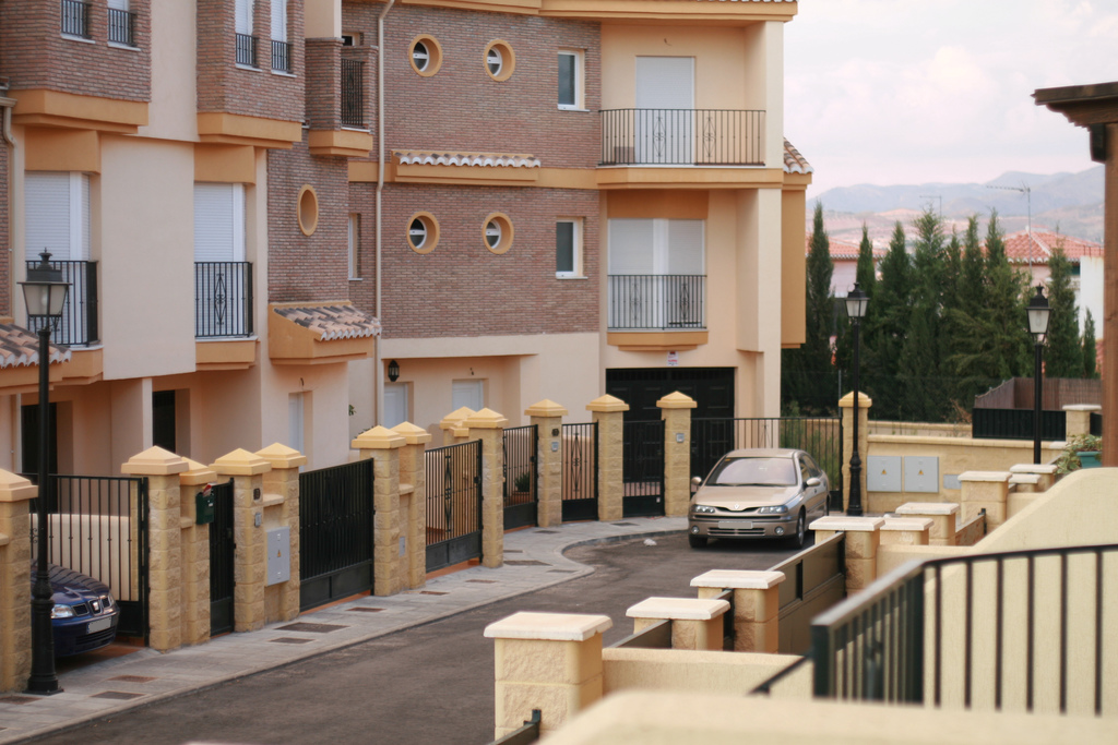 Calle en los Ogíjares (Granada, España)